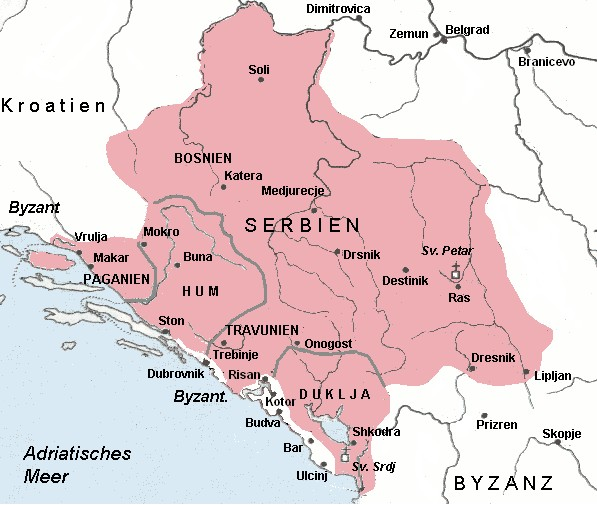 Serbien - Raszien (rechts im Bild), zusammen mit Bosnien, Paganien, Hum, Travunien und Diokletien (Duklja) im 9.Jhd.